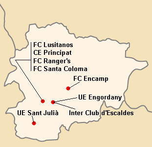 Répartition des clubs en Primera Divisio 2003-2004.